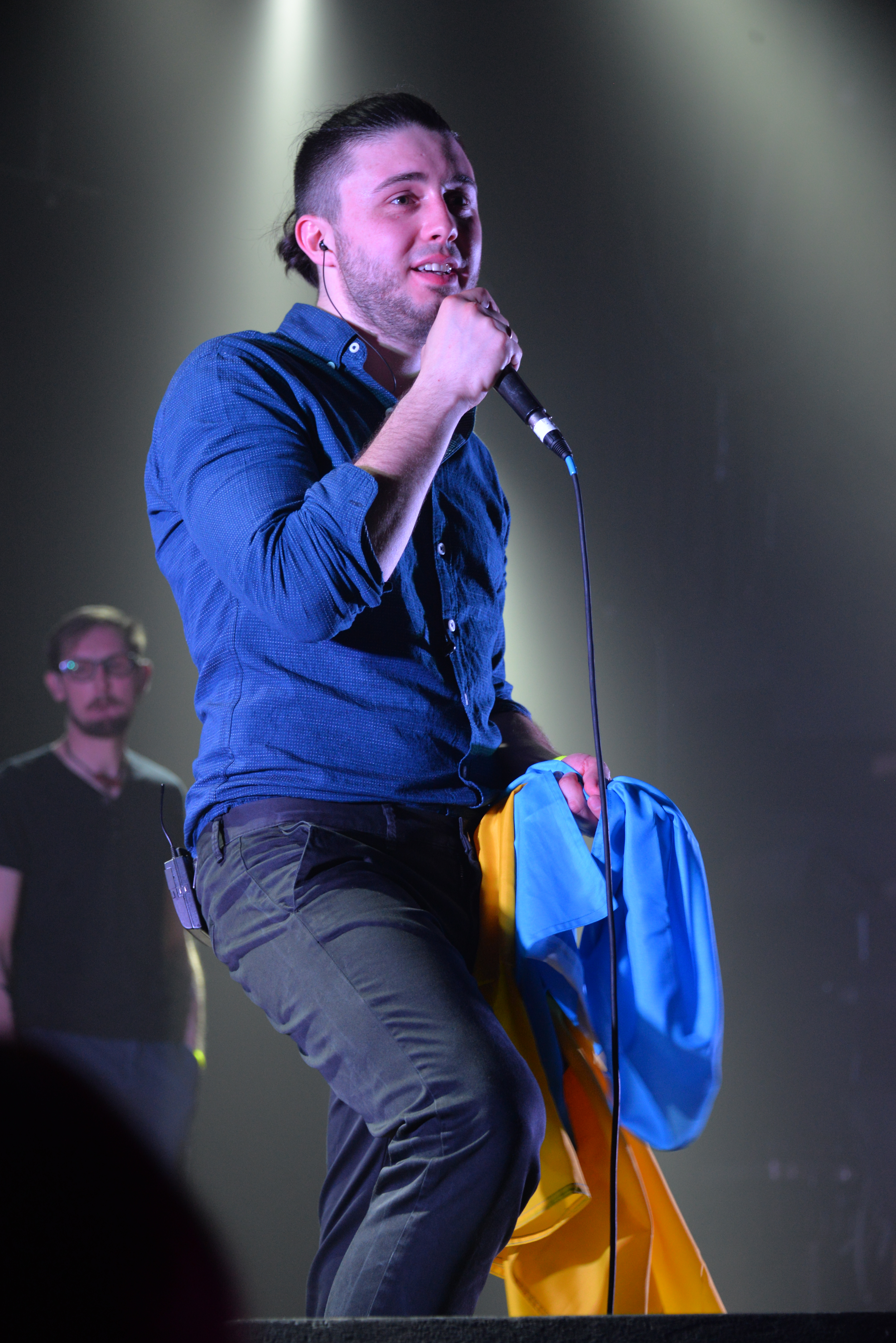 Фронтмен гурту "Антитіла" на виступі в концертному залі "Опера Гауз" у Торонто 21 квітня 2016